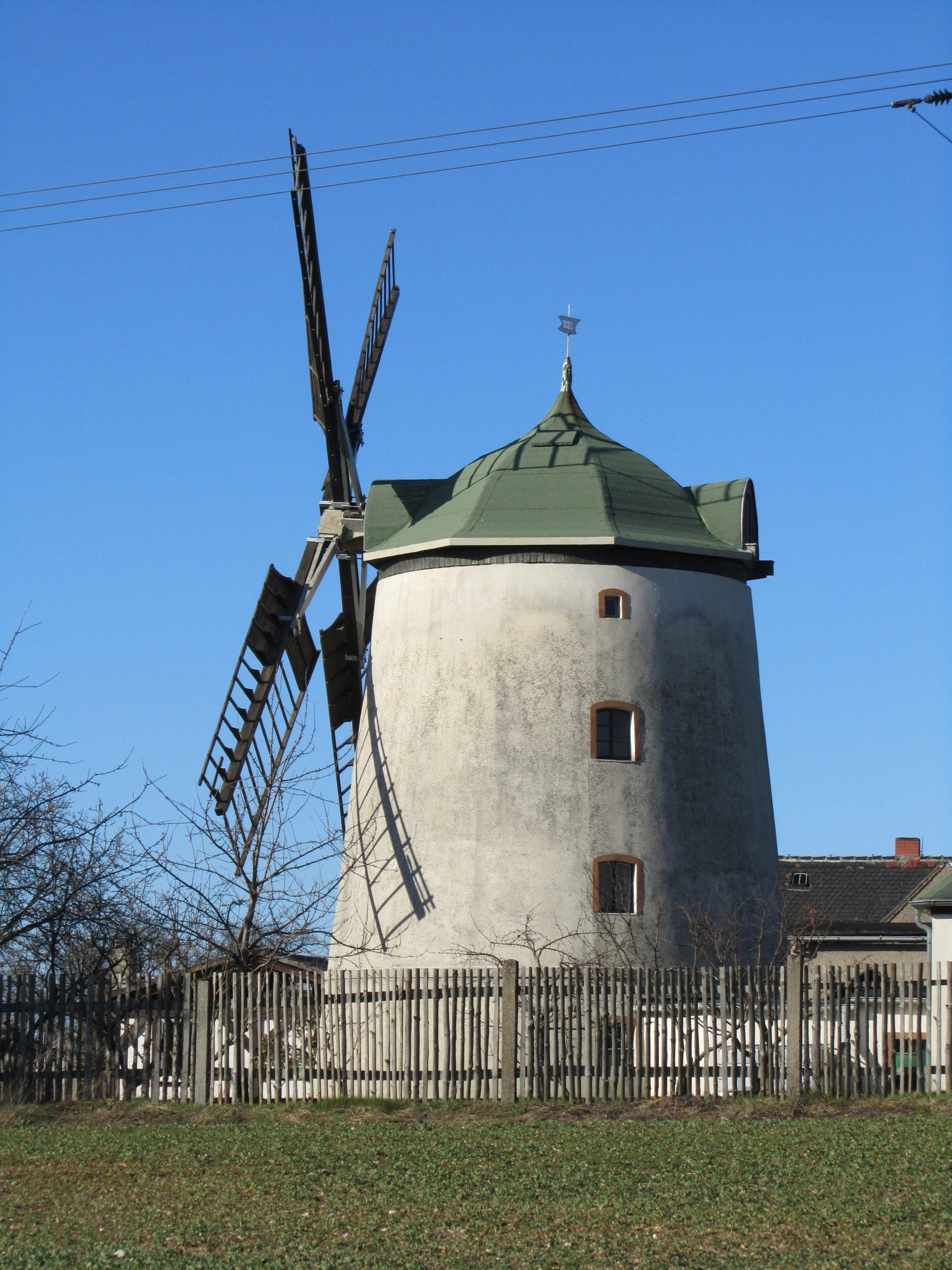 Paschwitz, Windmühle